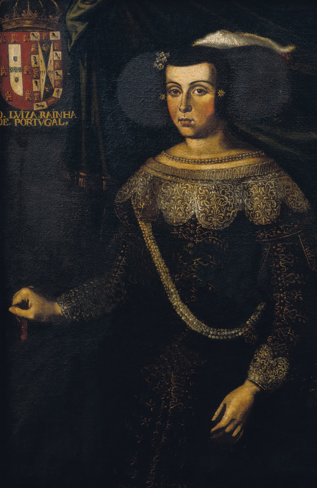 Portrait